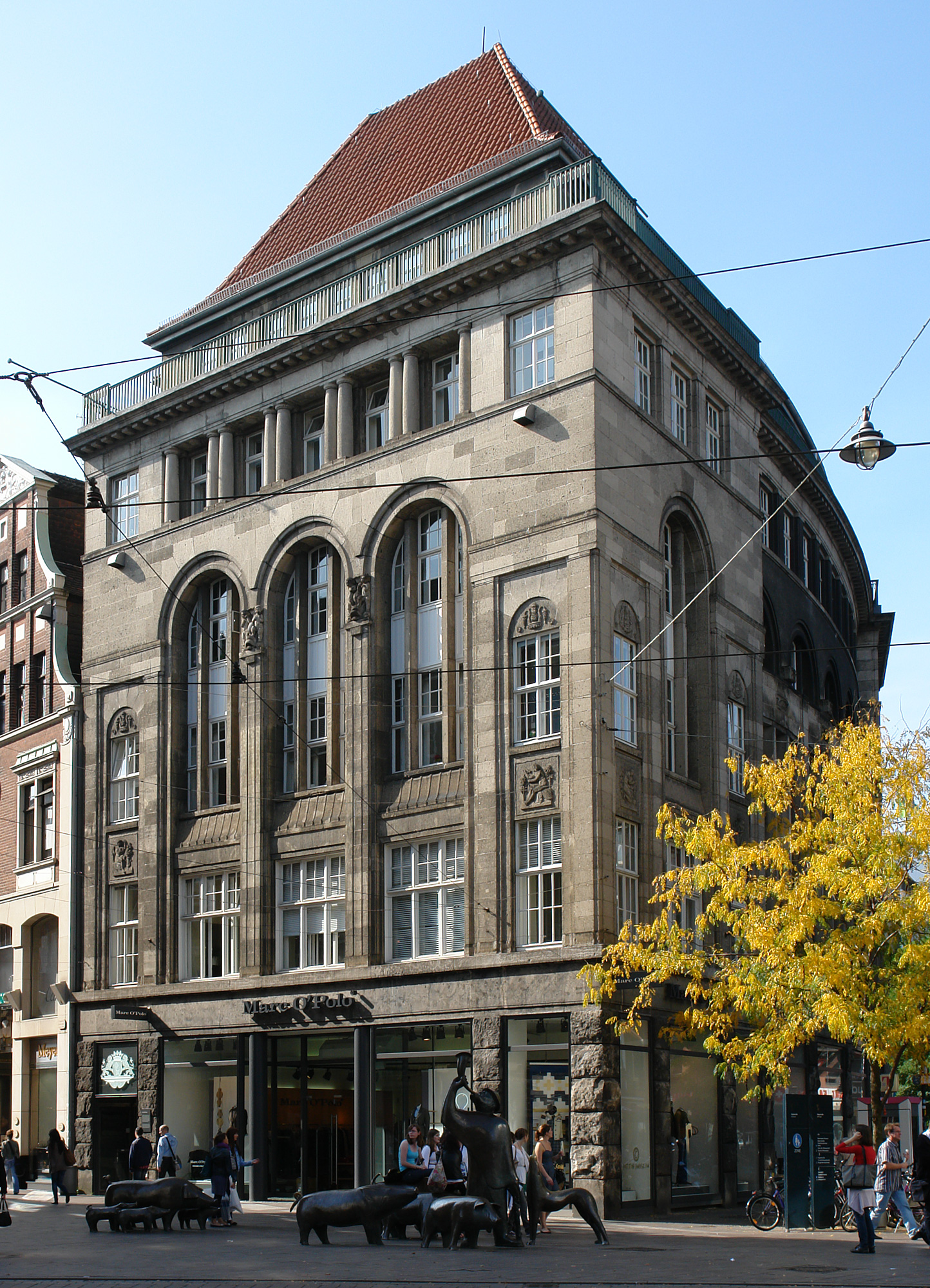 Seidenhaus Koopmann in Bremen, Sögestraße 62 Das abgebildete Objekt ist ein geschütztes Kulturdenkmal in der Freien Hansestadt Bremen, mit der Nr. 1150 beim Landesamt für Denkmalpflege registriert.